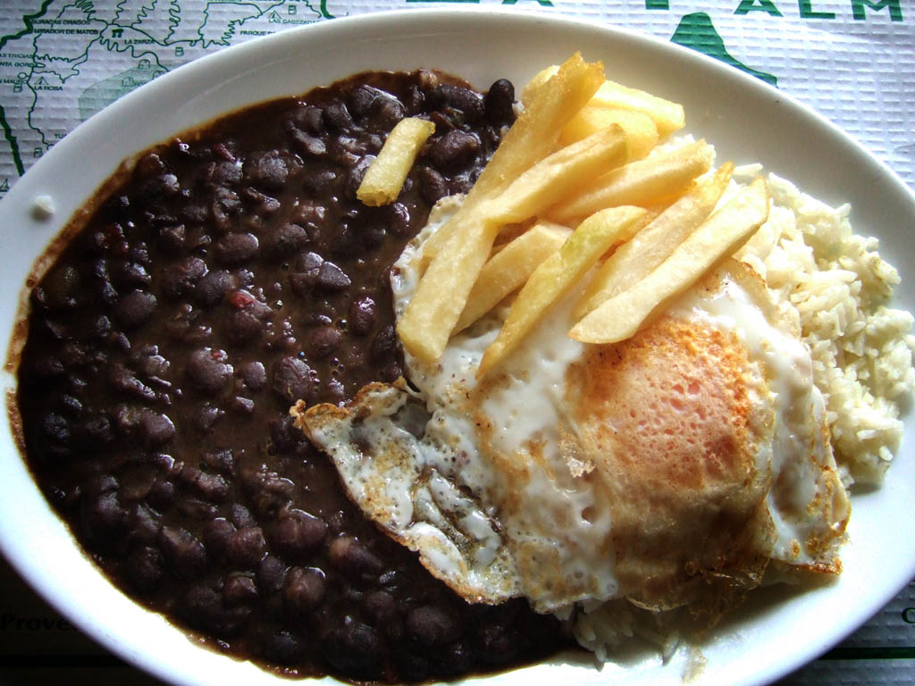 Comida: Arroz con frijoles. Este no es el plato de Moros y Cristianos. Esto es un pabellón criollo.